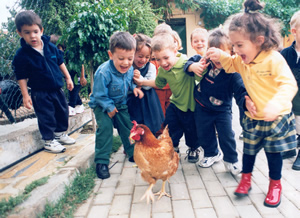 Centro de Educación Inicial San Pablo II. Riobamba. Niños de 2 a 5 años. niños comparten e un ambiente lleno de colaboración, alegría y estimulación